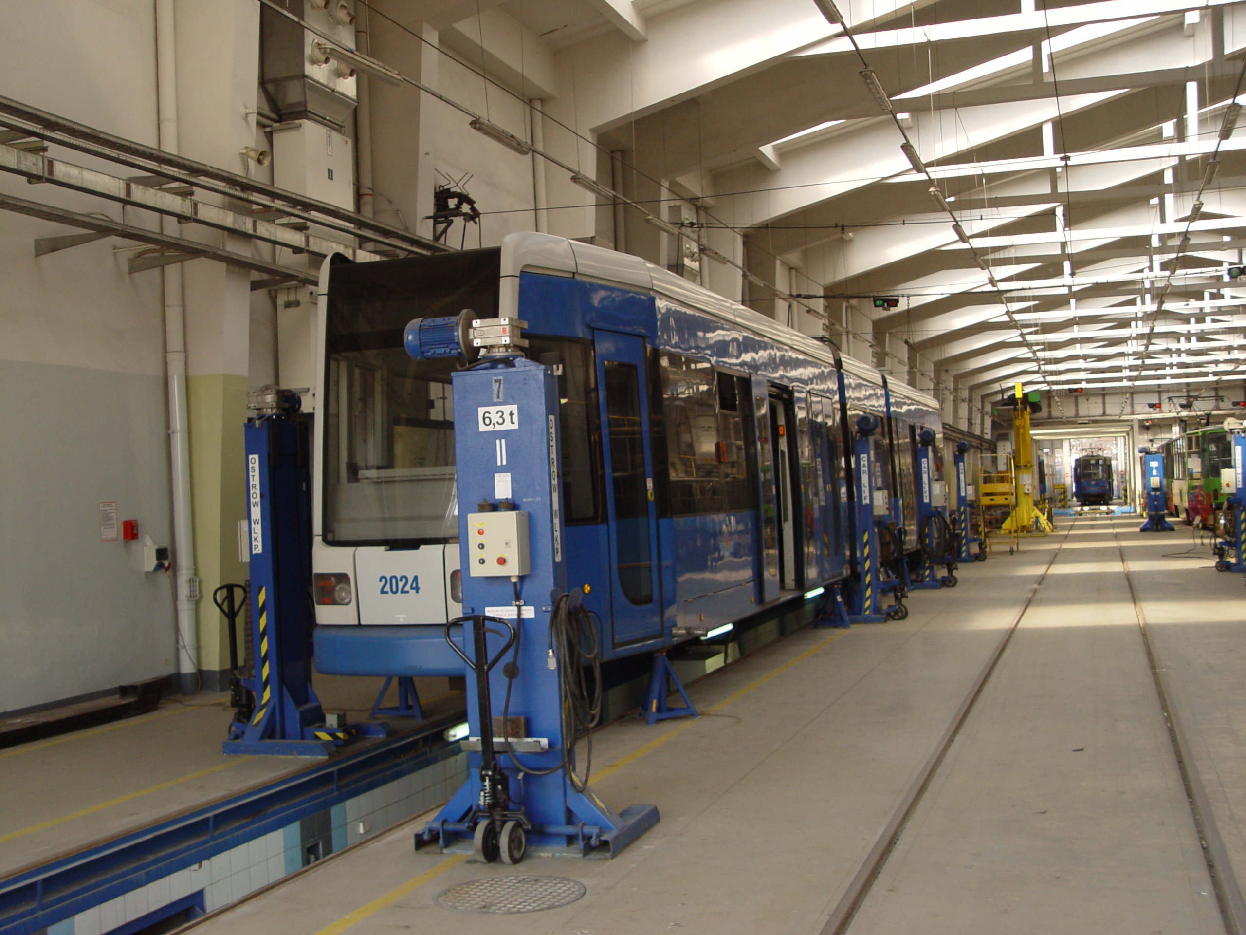 Zajezdnia podgórze w Krakowie